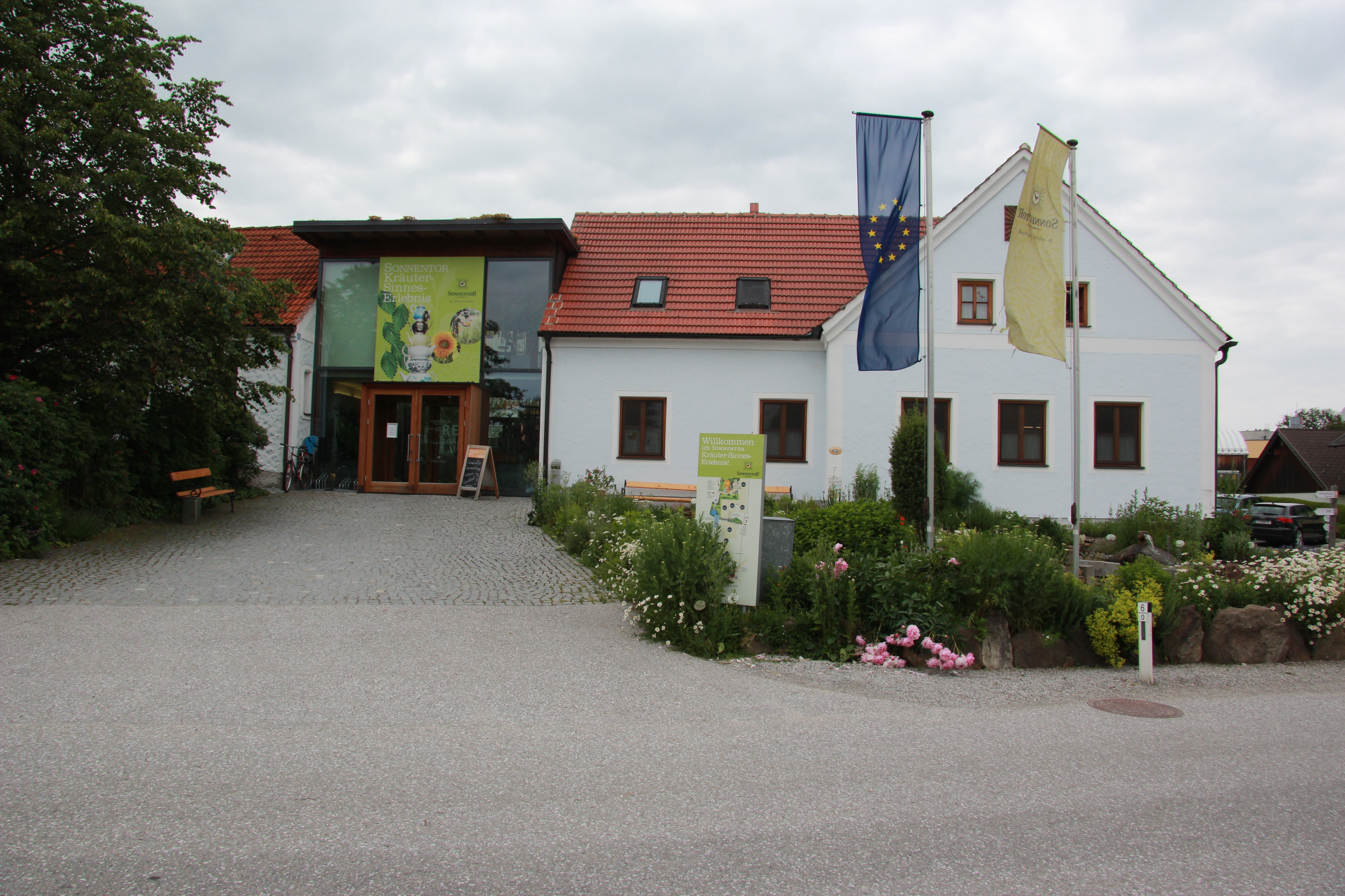 Haupteingang der Firtma Sonnentor in Sprögnitz, Niederösterreich